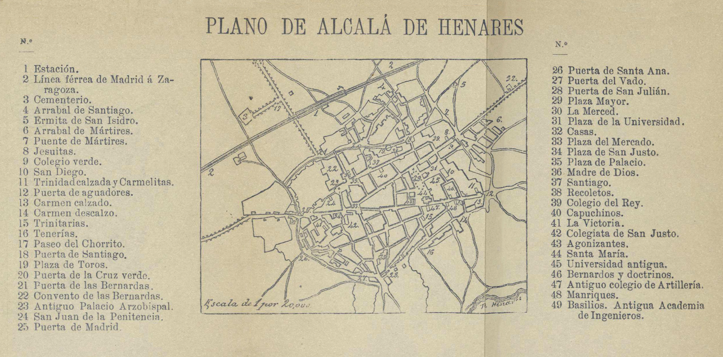 Plano urbano de Alcalá de Henares, publicado en el libro "Plano y guía del viajero en Alcalá de Henares, Guadalajara y Sigüenza" de Emilio Valverde Álvarez, en 1886. A escala 1:20.000. En el que se enumera la distribución de los edificios más emblemáticos en esa época: Estación Línea férrea de Madrid a Zaragoza Cementerio Arrabal de Santiago Ermita de San Isidro Arrabal de Mártires Puente de Mártires Jesuitas Colegio Verde San Diego Trinidad calzada y Carmelitas Puerta de aguadores Carmen calzado Carmen descalzo Trinitarias Tenerías Paseo del "Chorrito" Puerta de Santiago Plaza de Toros Puerta de la Cruz verde Puerta de las Bernardas Convento de las Bernardas Antiguo Palacio Arzobispal San Juan de la Penitencia Puerta de Madrid Puerta de Santa Ana Puerta del Vado Puerta de San Julián Plaza Mayor La Merced Plaza de la Universidad Casas Plaza del Mercado Plaza de San Justo Plaza de Palacio Madre de Dios Santiago Recoletos Colegio del Rey Capuchinos La Victoria Colegiata de San Justo Agonizantes Santa María Universidad antigua Bernardos y doctrinos Antiguo colegio de Artillería Manriques Basilios. Antigua Academia de Ingenieros